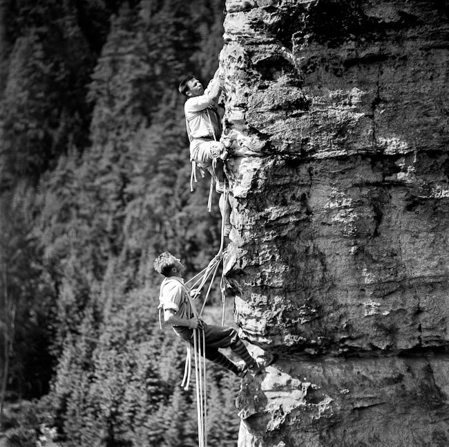 Skalák, Maják - Gotická hrana, lezci Svatoš a Cerman, negativ číslo: 3_7100